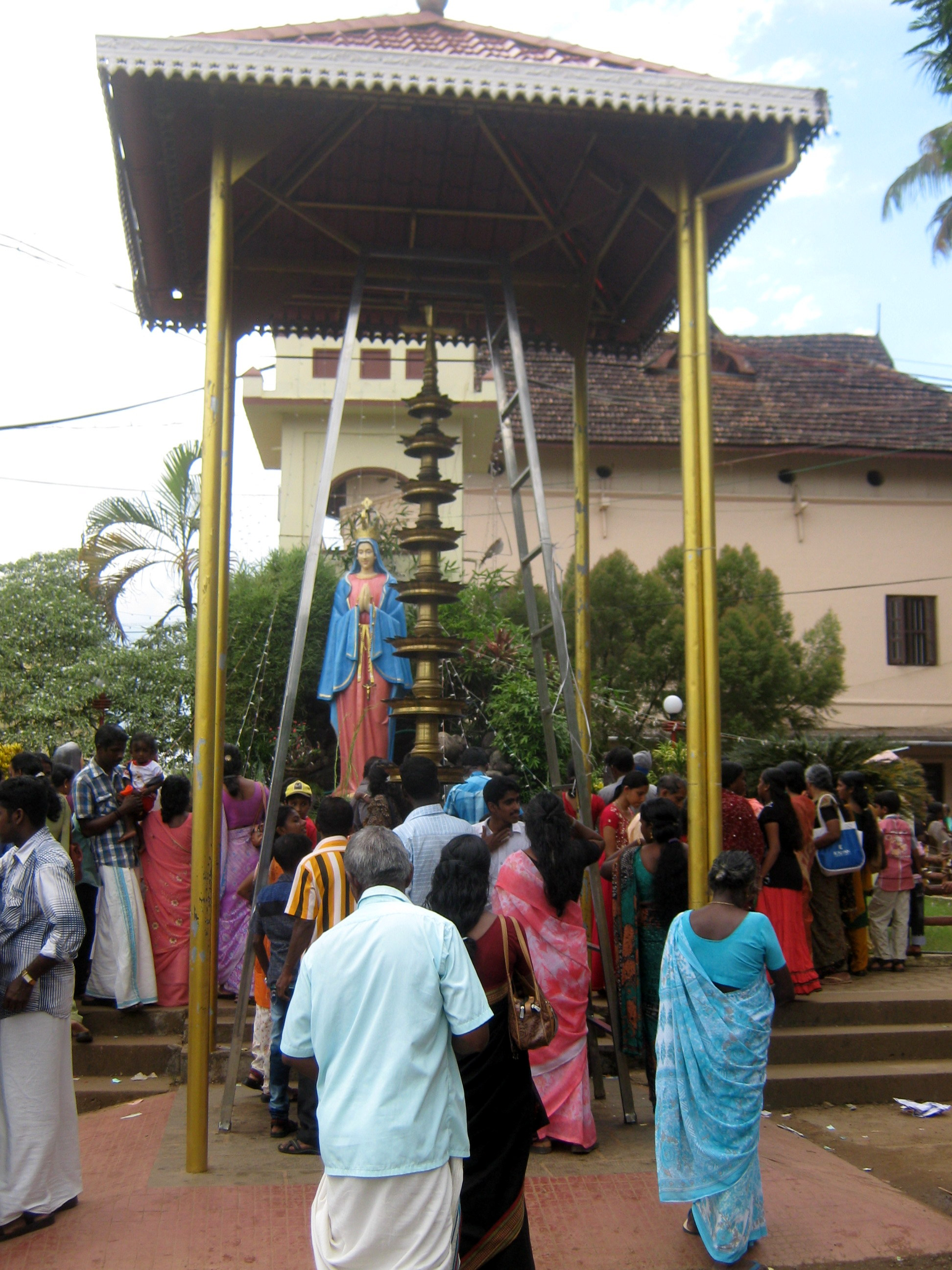 കൊരട്ടിമുത്തി തിരുനാള്‍ 2012